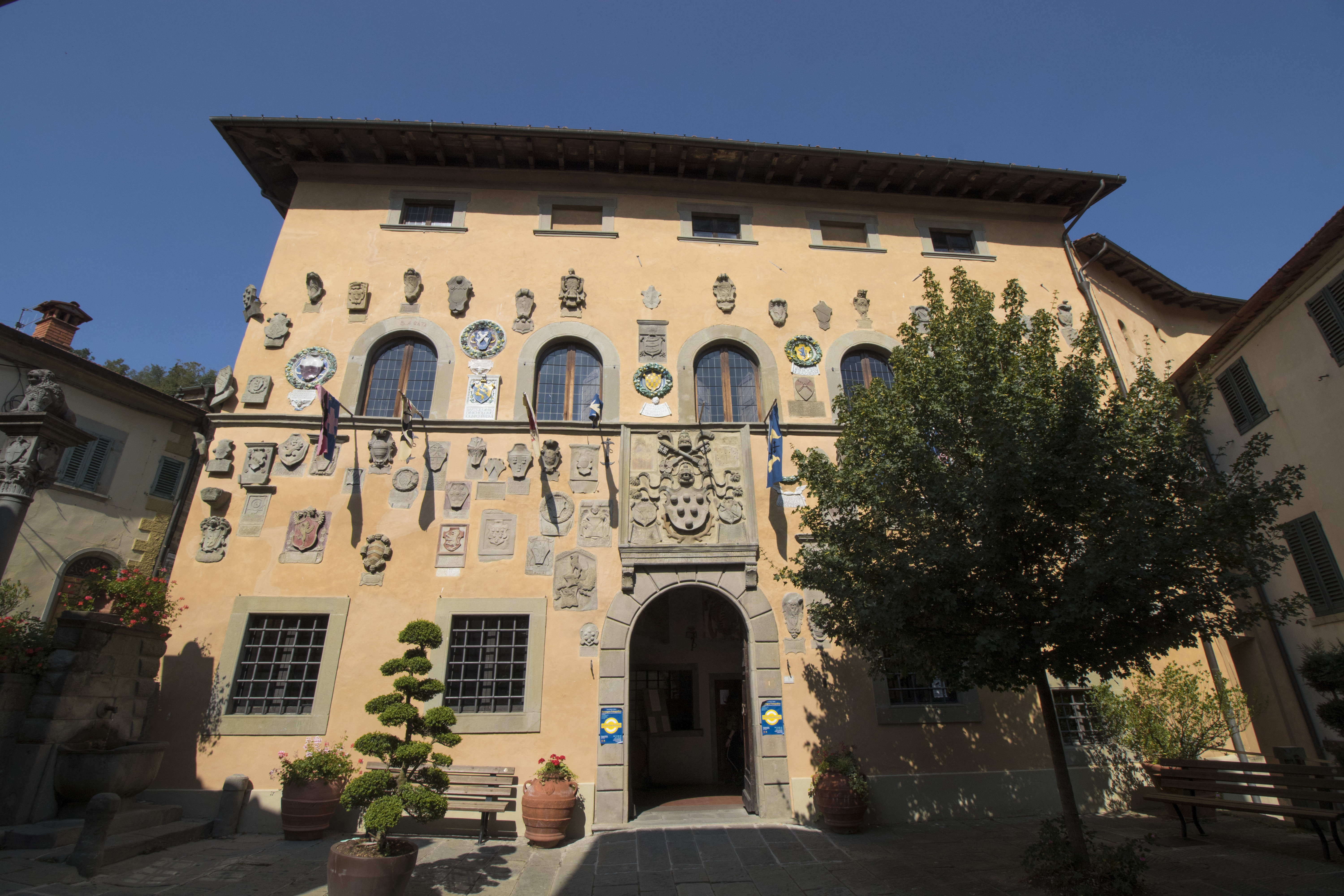 Palazzo dei Capitani della Montagna This is a photo of a monument which is part of cultural heritage of Italy.